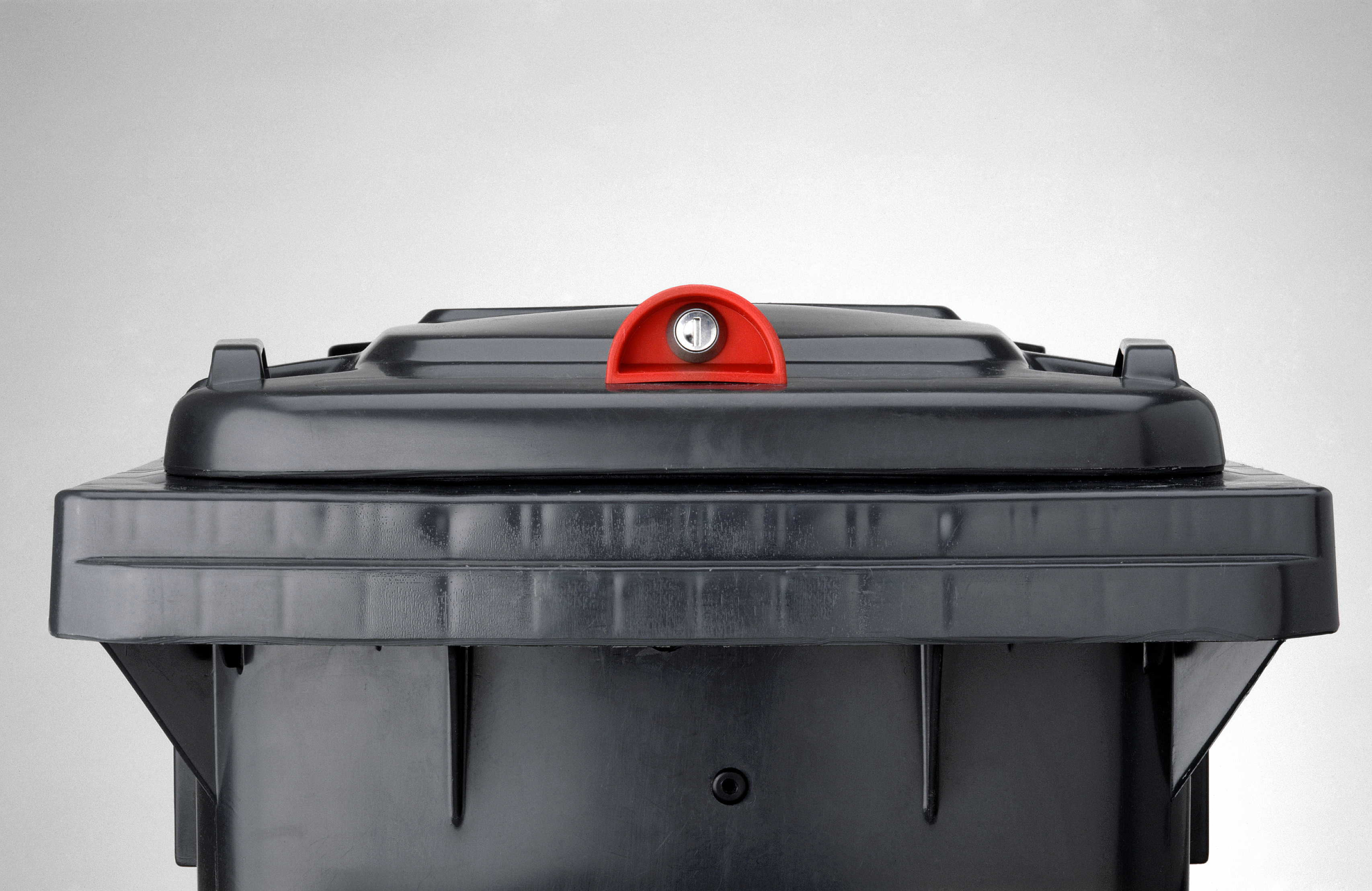 Schwerkraftschloss mit Müllbehälter